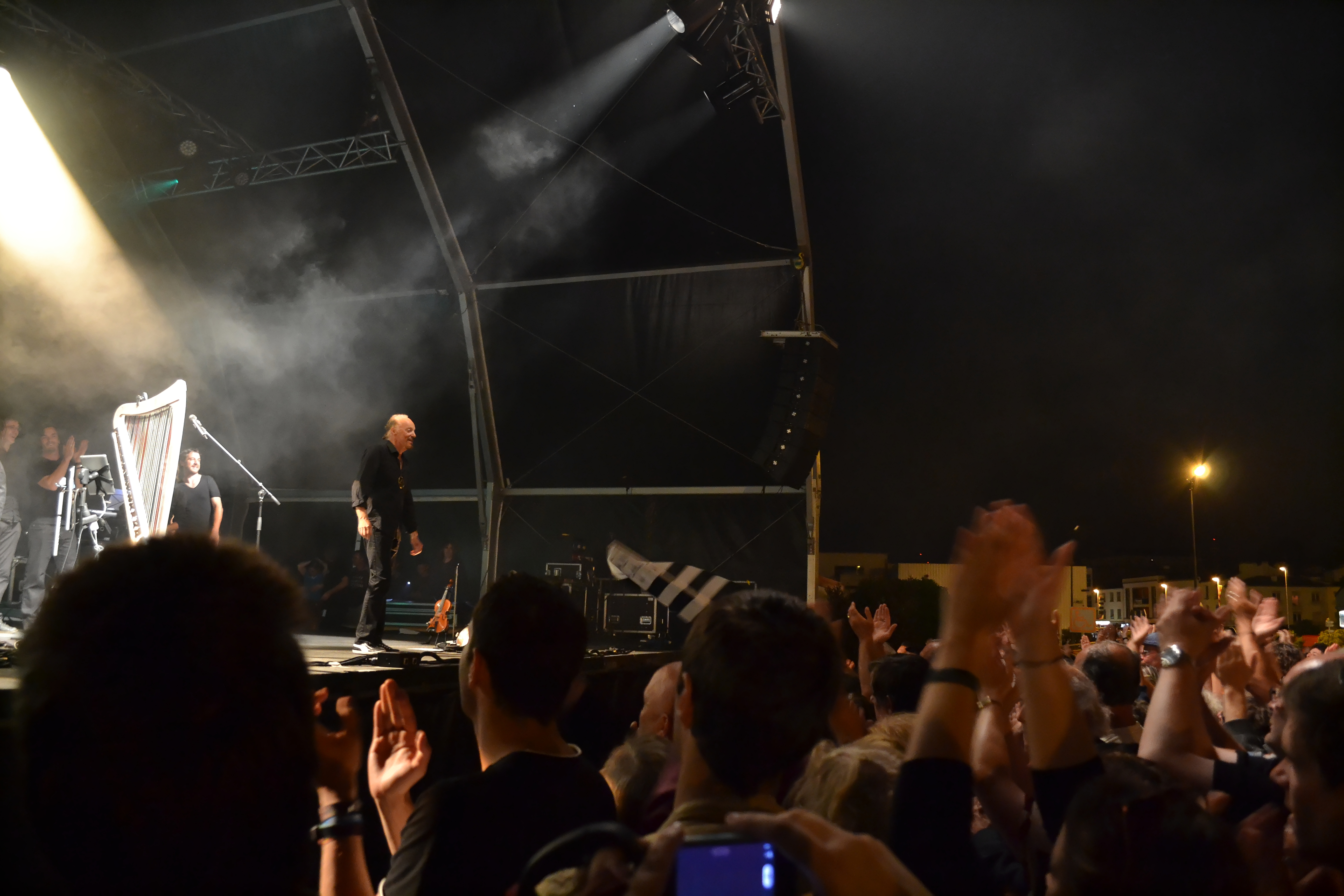 Alan Stivell en concert gratuit lors des Jeudis du port à Brest le 15 août 2013.